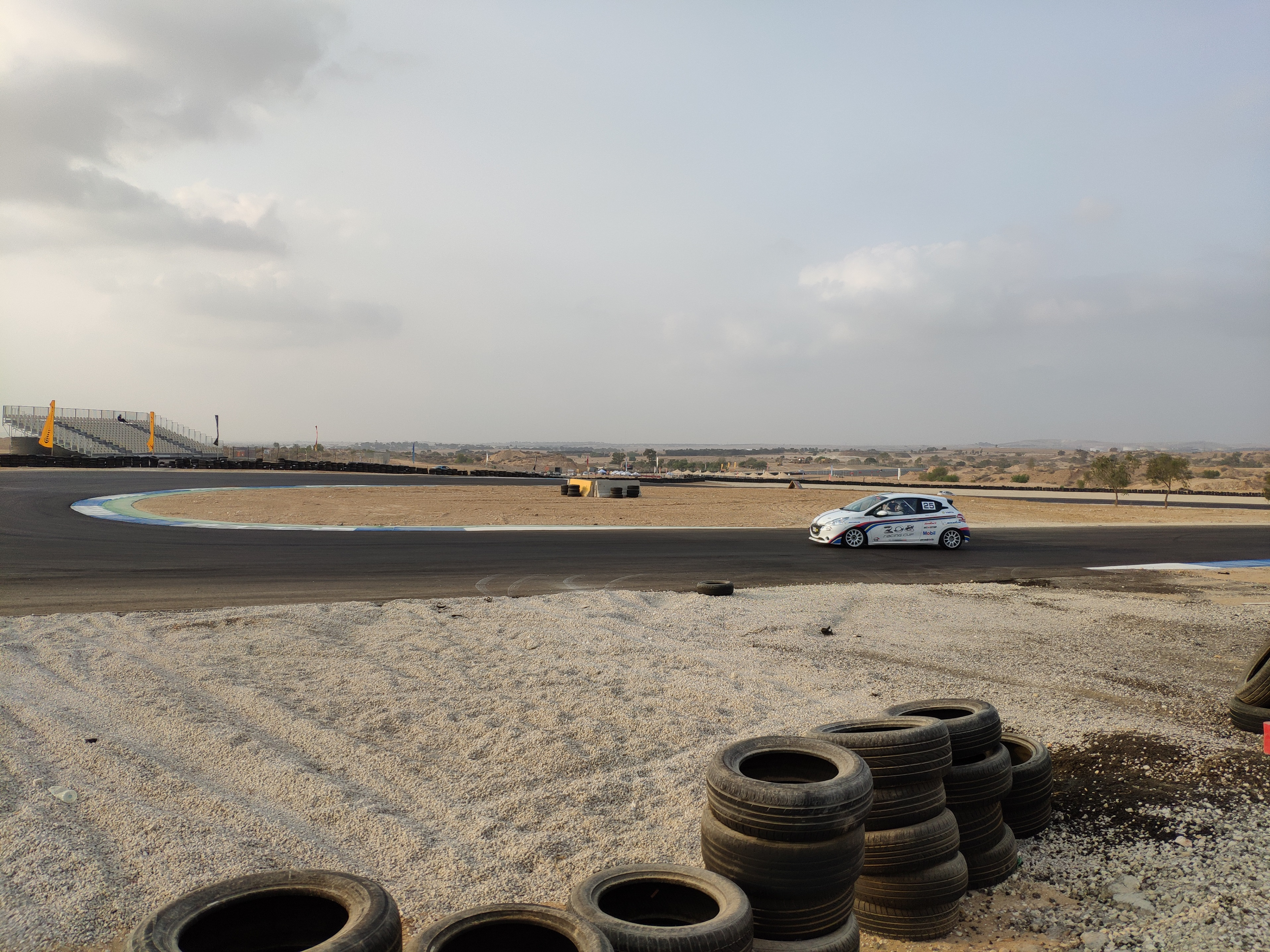 הפארק המוטורי באר שבע במהלך אימון ליגת פיג'ו Racing Cup 208